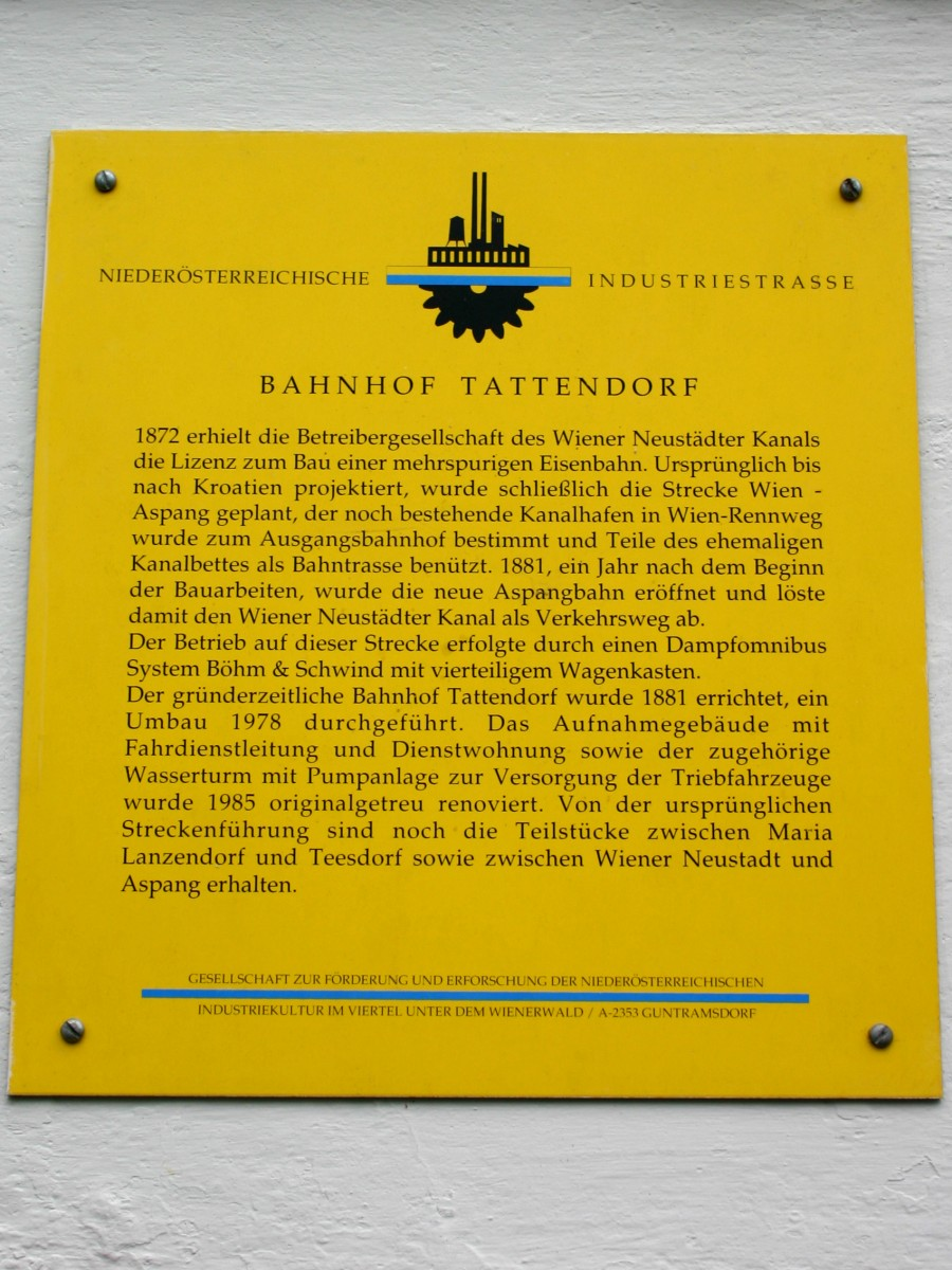 Eingangsbereich zum Bahnhof Tattendorf